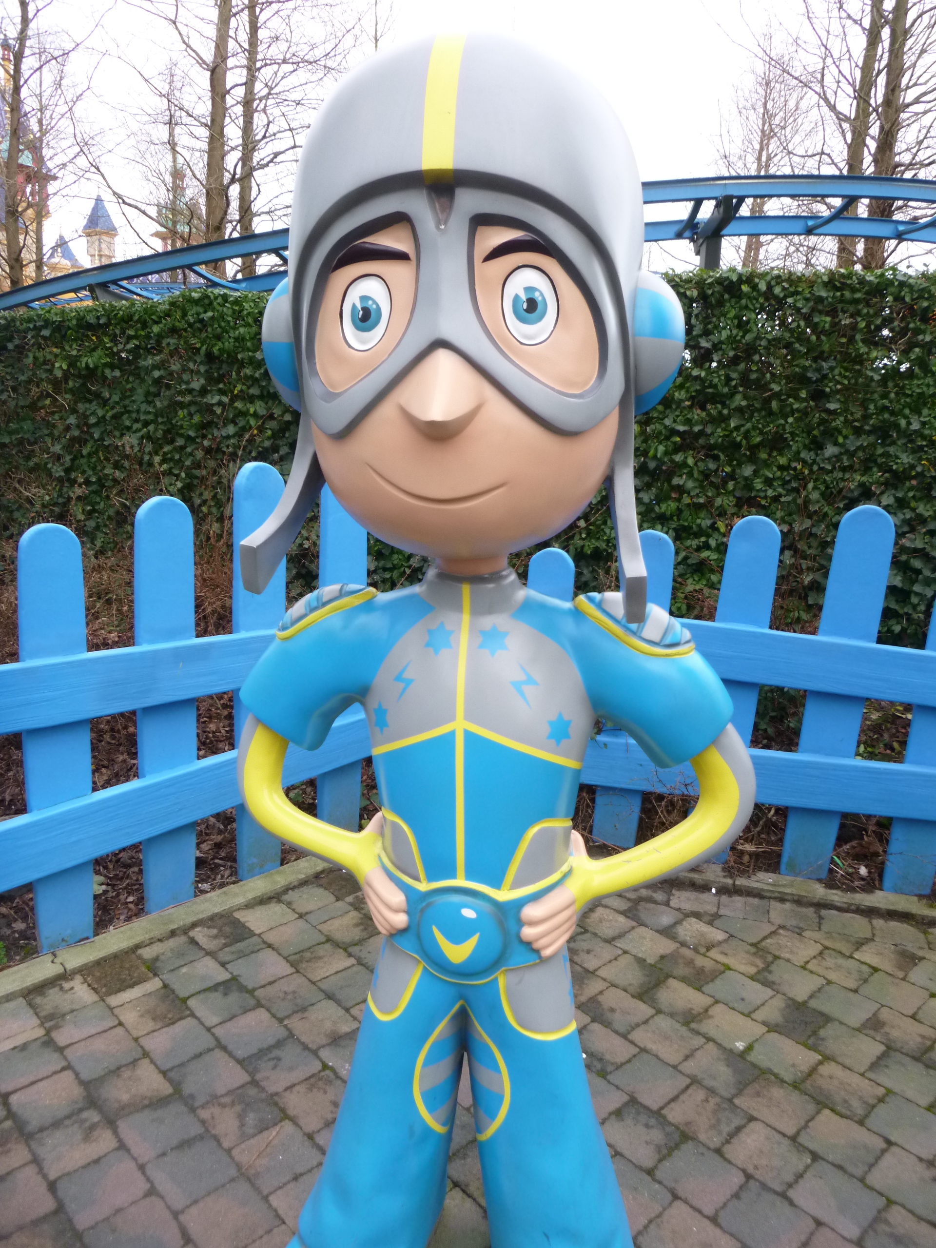 Victor à Plopsaland